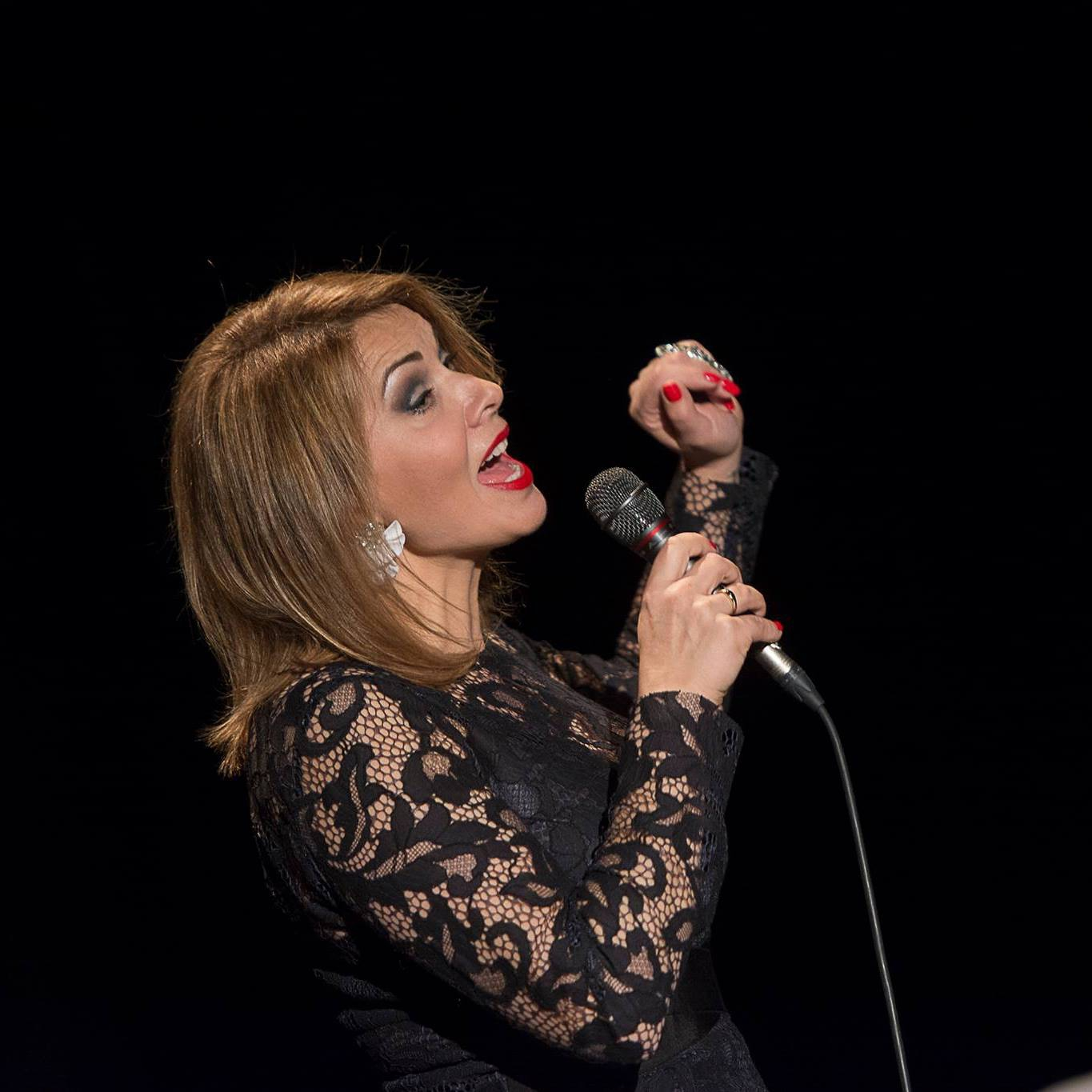 Foto: Ritvars Sproģis photo taken: Liepājas Latviešu biedrības nams Koncerts: Fly Love